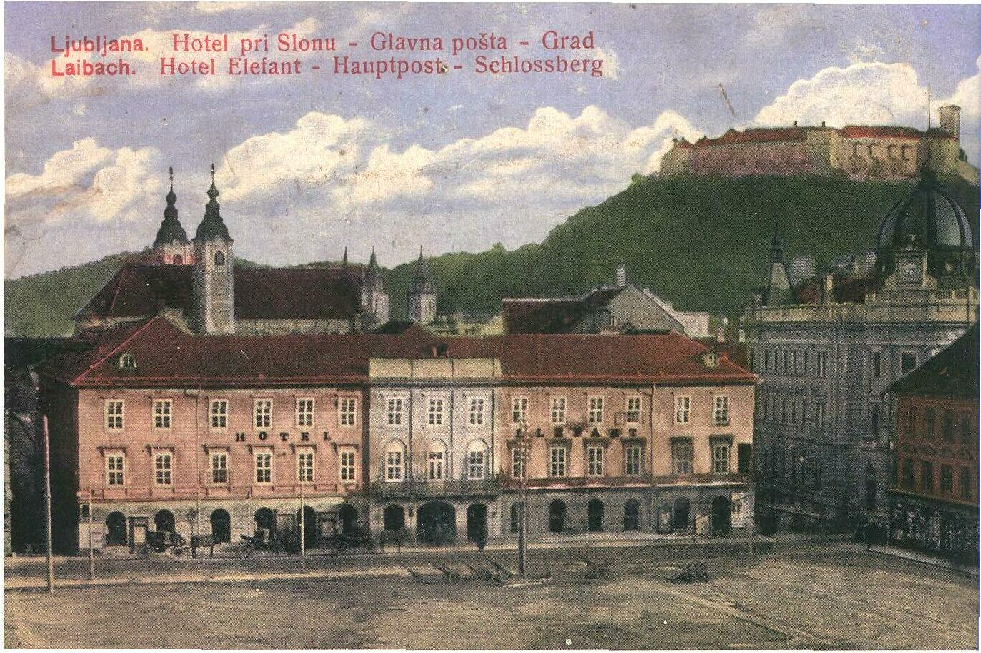 Hotel Slon v Ljubljani na razglednici iz leta 1914